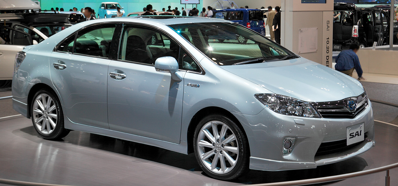 Toyota Sai.